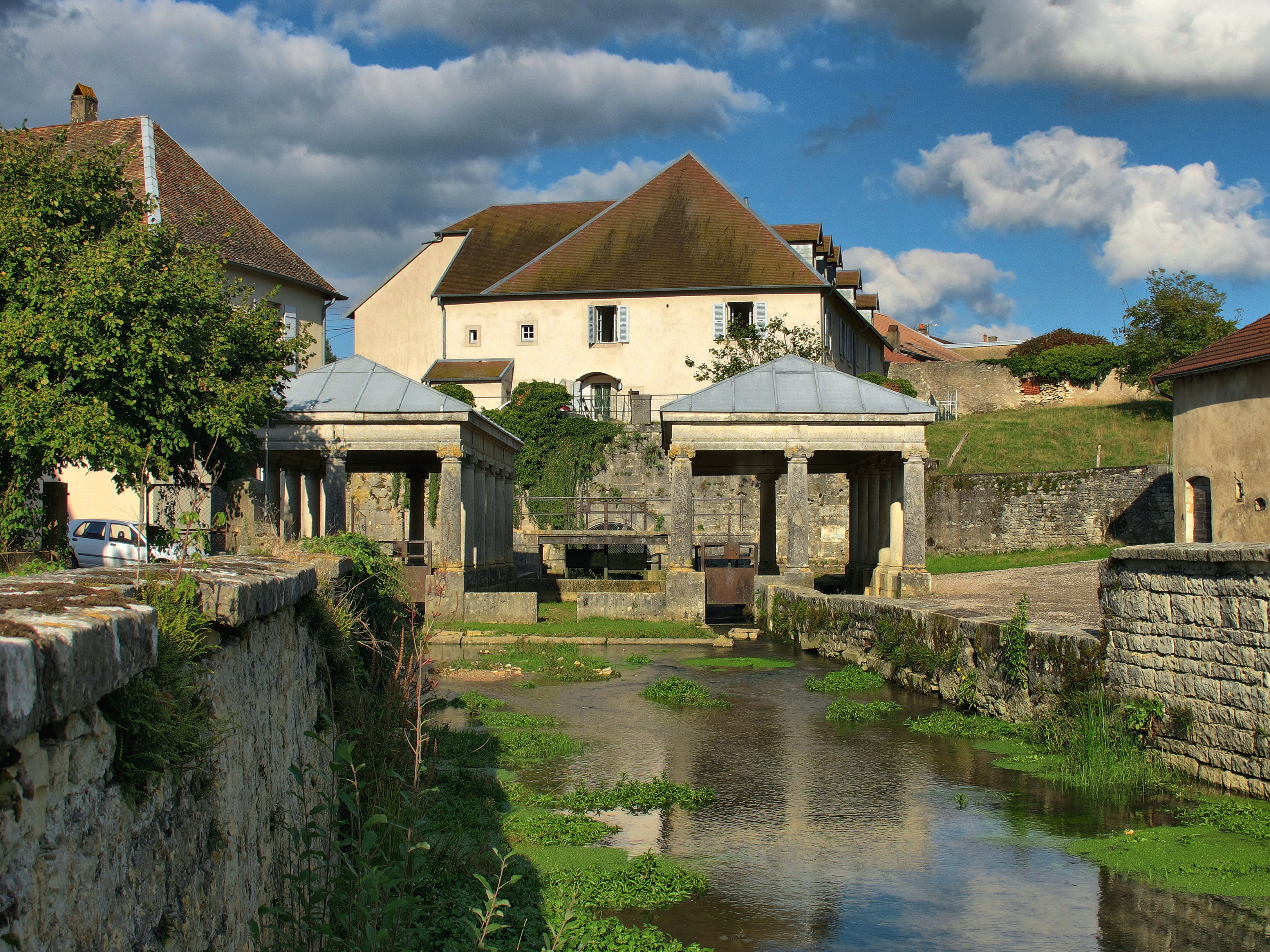 Fontaine d'Étuz (Haute-Saône, France)